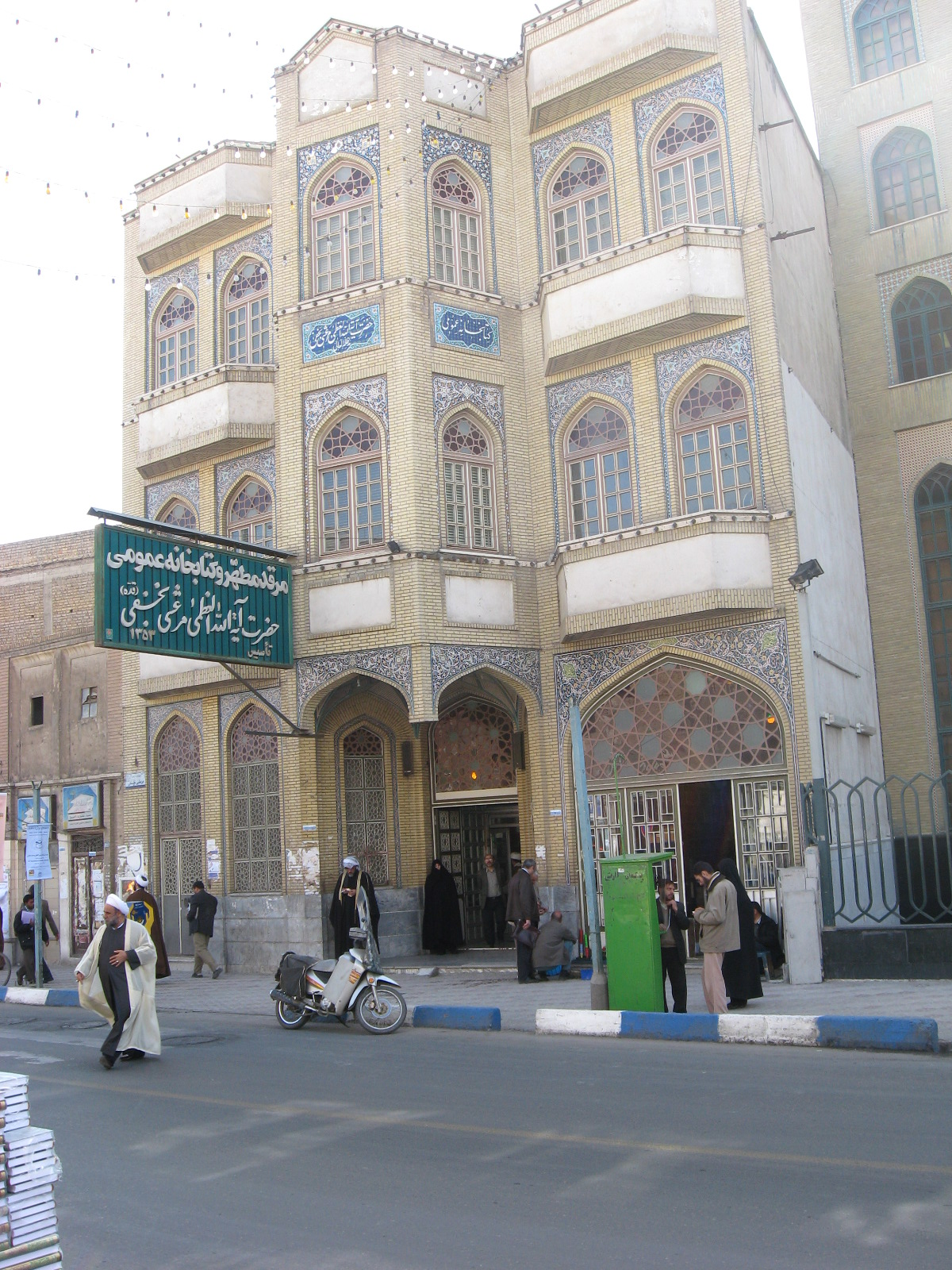 مرقد و کتابخانهٔ آیت‌الله مرعشی نجفی